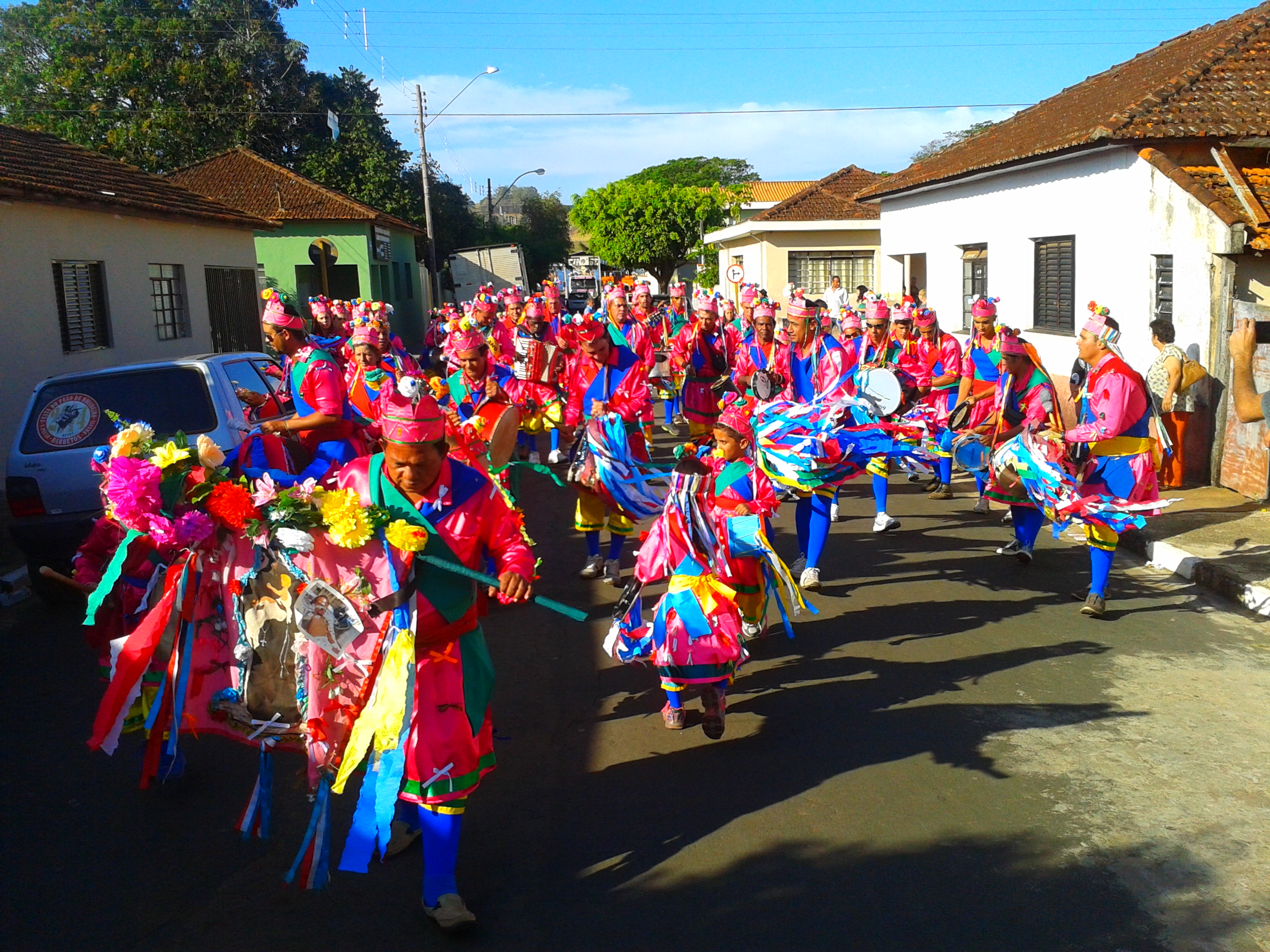 Foto tirada no dia da Festa de Congo na cidade de Santo Antônio da Alegria